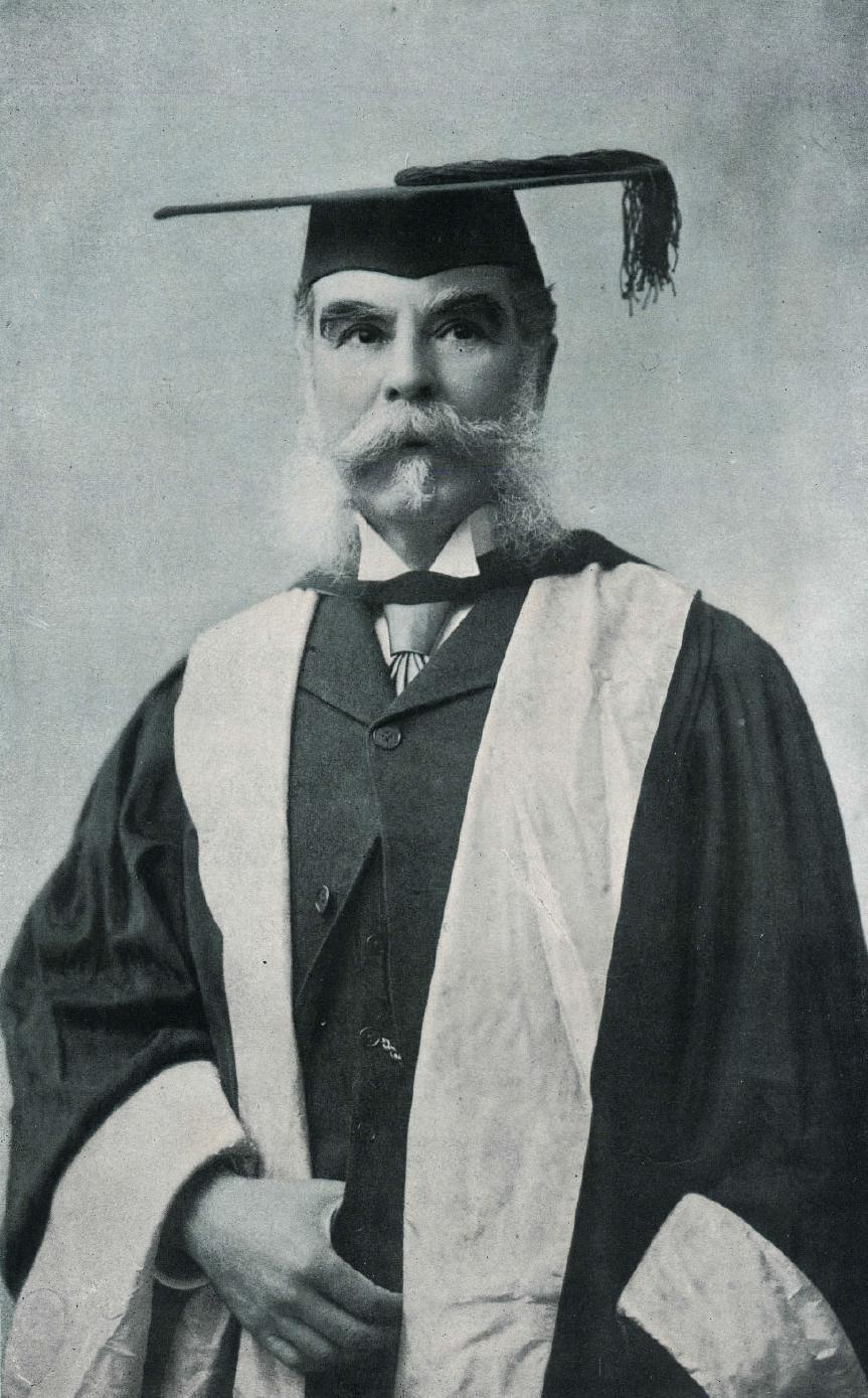 Marcial Martínez Cuadros, abogado y político liberal chileno. Nació en La Serena, el 30 de julio de 1832. Falleció en Santiago, el 8 de febrero de 1918.